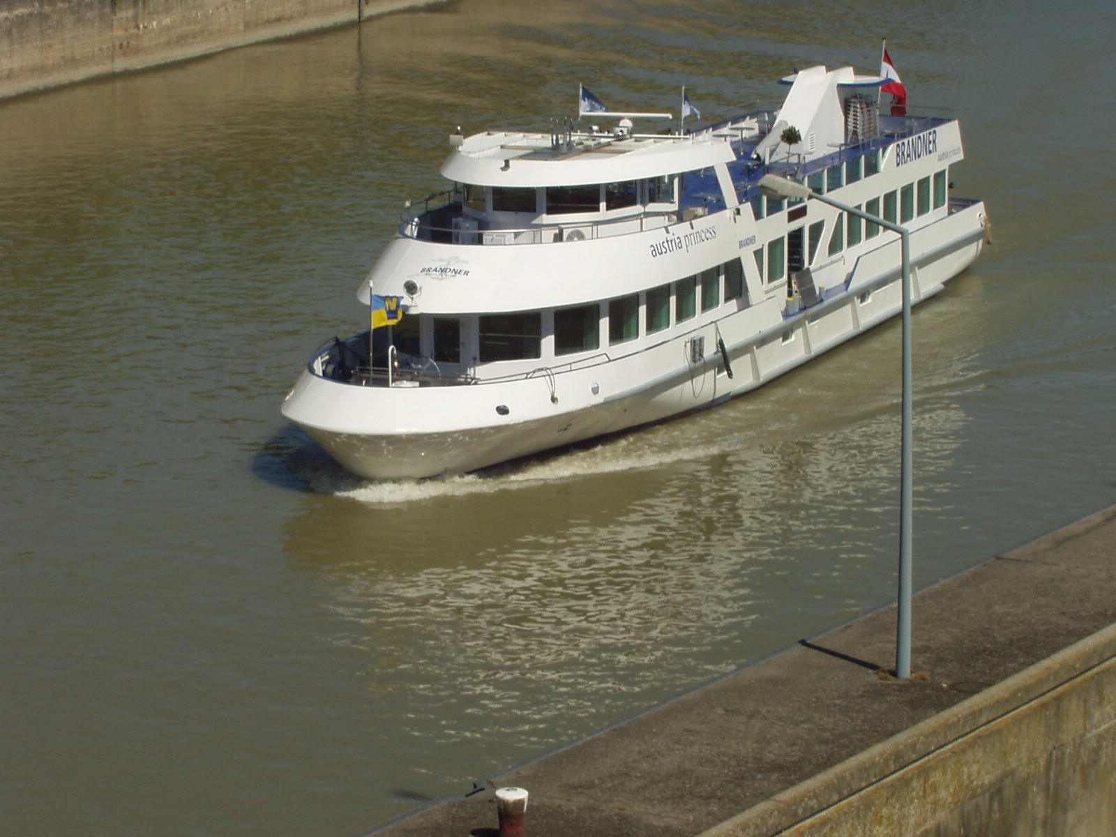 Das Passagierschiff "austria princess" in der Schleuseneinfahrt des Kraftwerkes Abwinden-Asten (Donau, Oberösterreich)